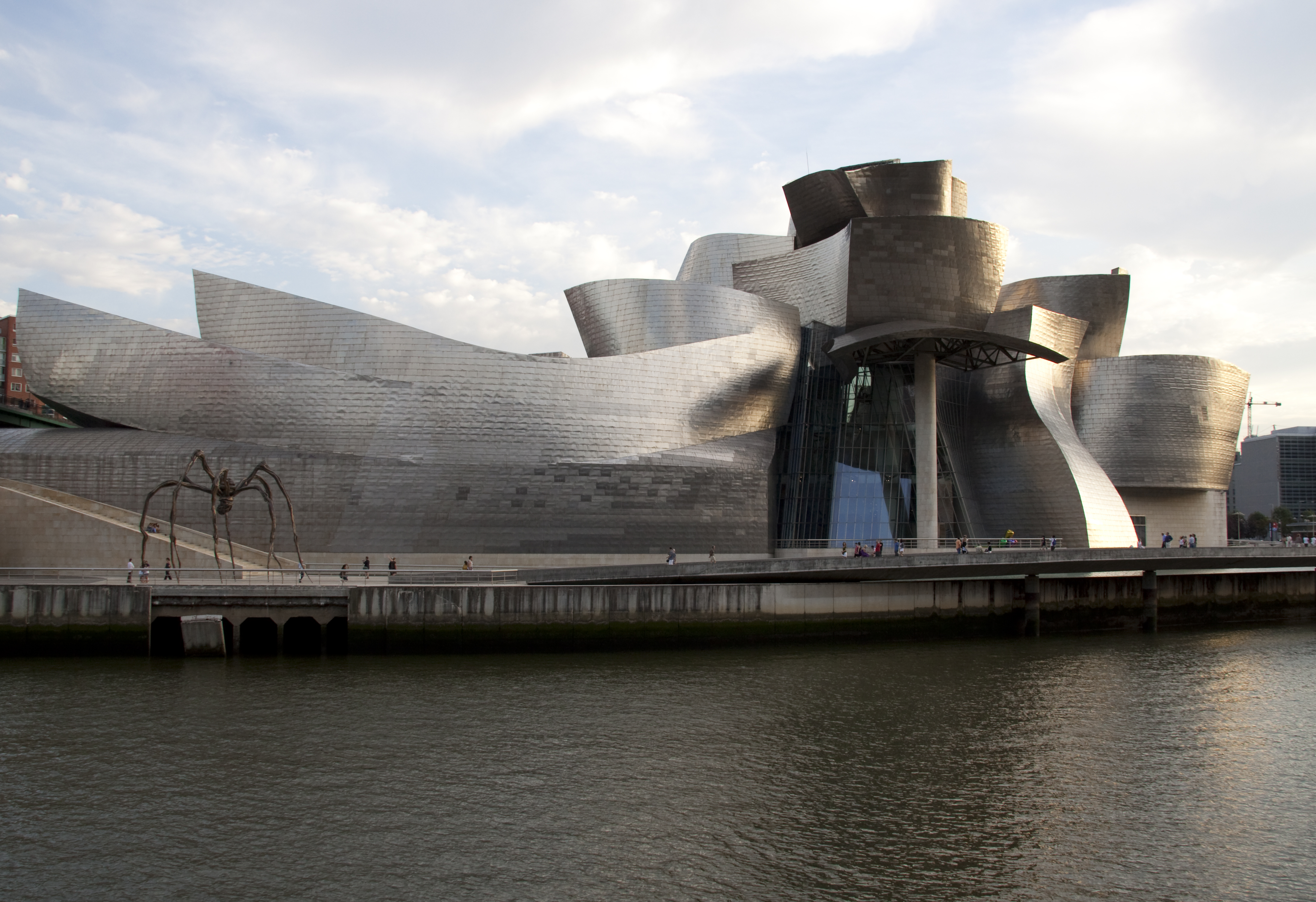 Guggenheim 24